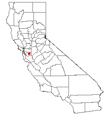 Komt van de Engelse wikipedia